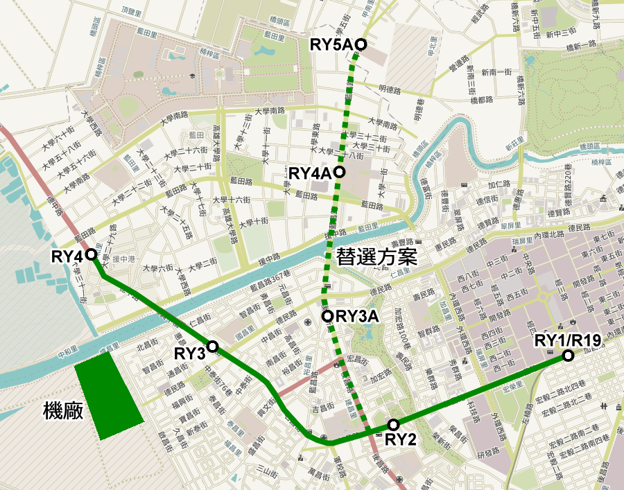 2000年左右的高雄捷運右昌延伸線版本